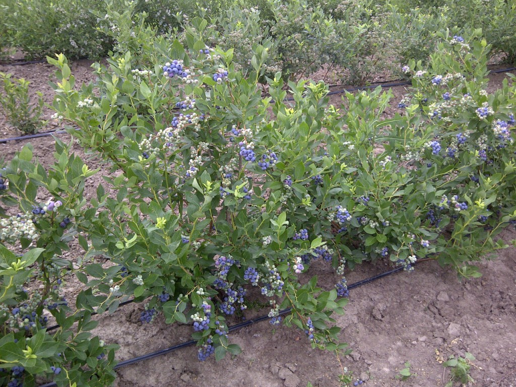 Вакциниум щитковый (голубика щитковая) - сорт Дюк в период плодоношения